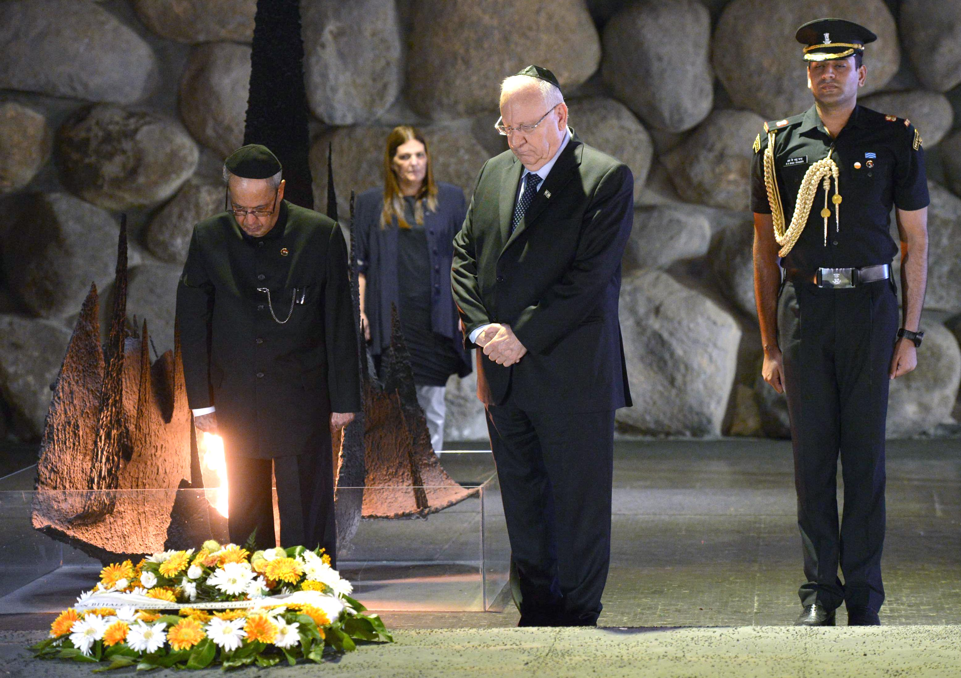 נשיא הודו פרנב מוקהרג'י יחד עם נשיא מדינת ישראל ראובן ריבלין בעת ביקורו ביד ושם